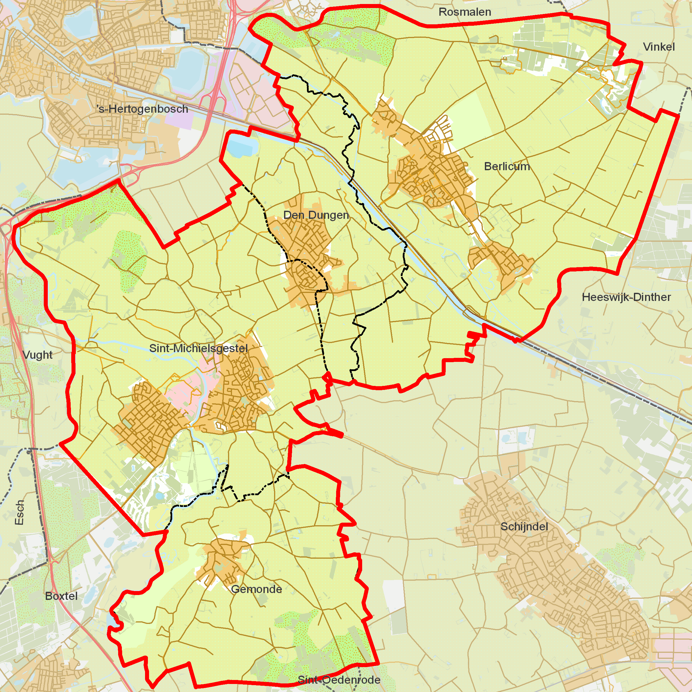 BAG woonplaatsen - Gemeente Sint-Michielsgestel.png